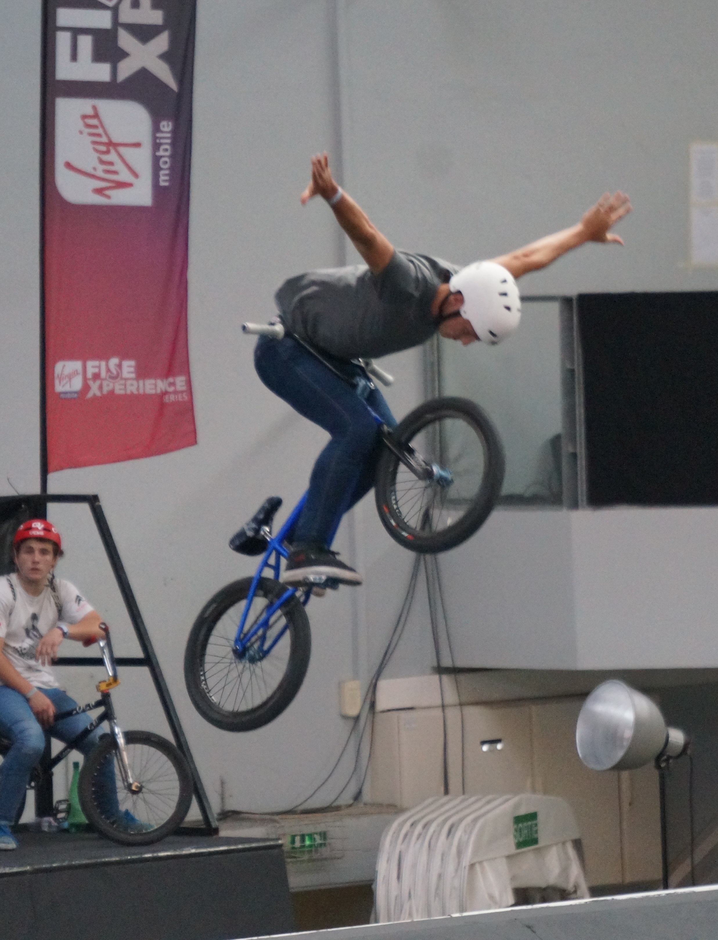 lors de FISE Xpérience Reims 2015.